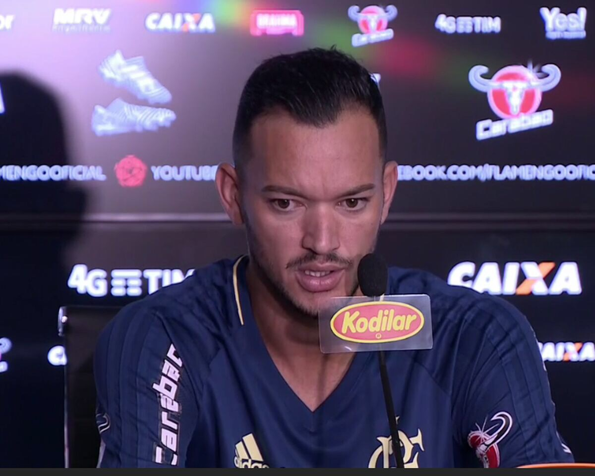 Jogador Rever dando entrevista coletiva com patrocínio da Kodilar no microfone